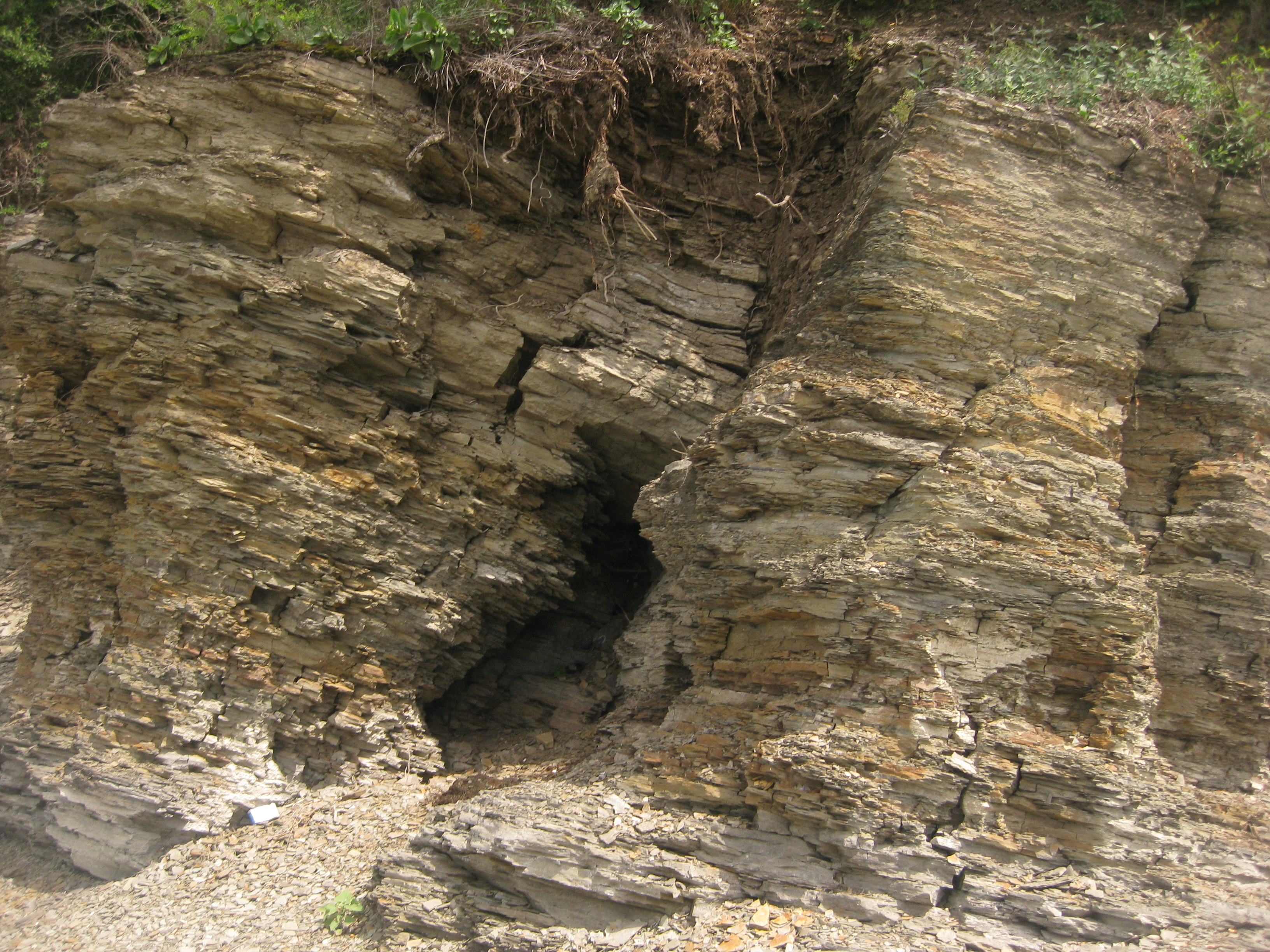 Розріз гораївської свити, Кам'янець-Подільський район, поблизу с. Гораївка